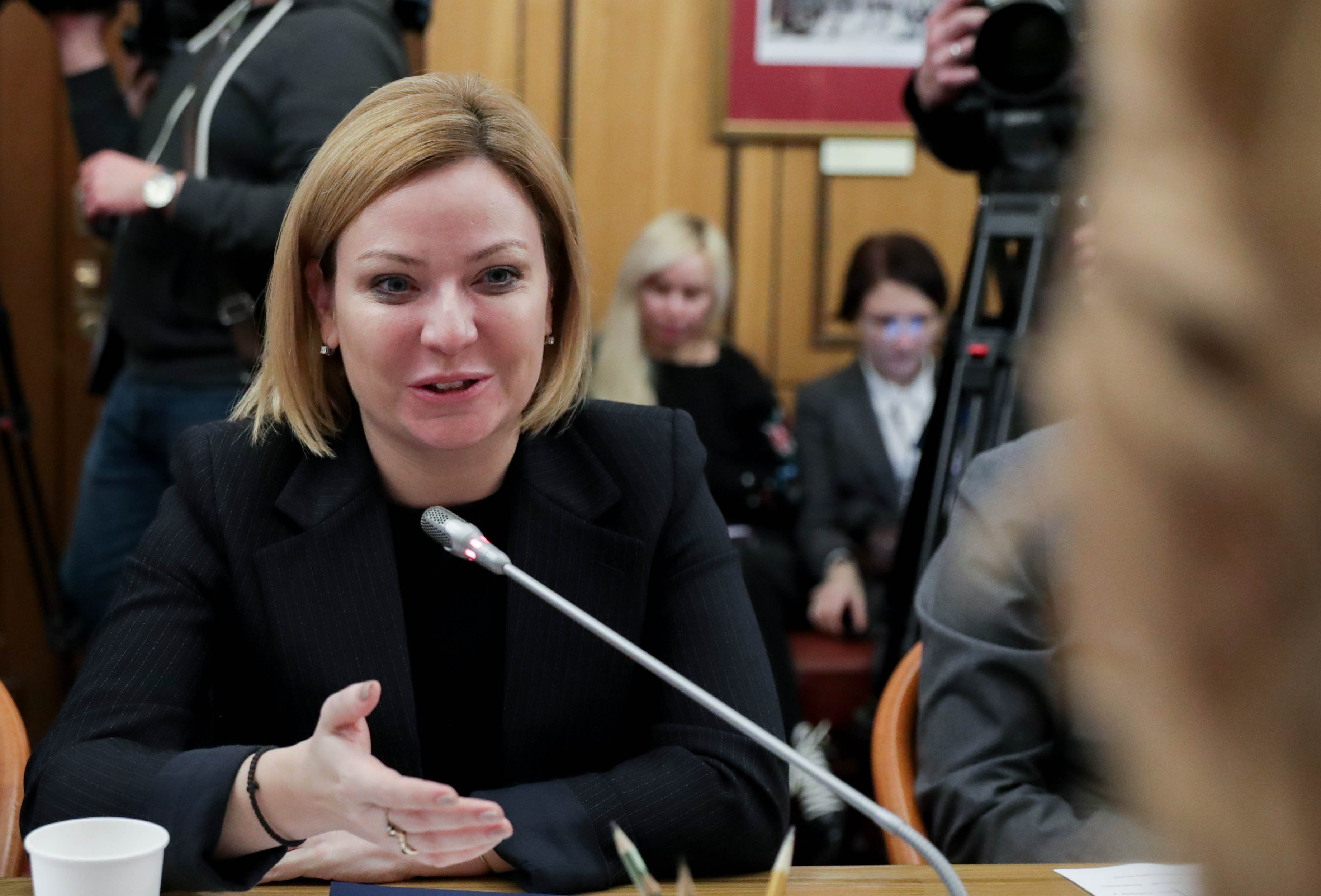 Ольга Борисовна Любимова (род.1980) — российский государственный деятель